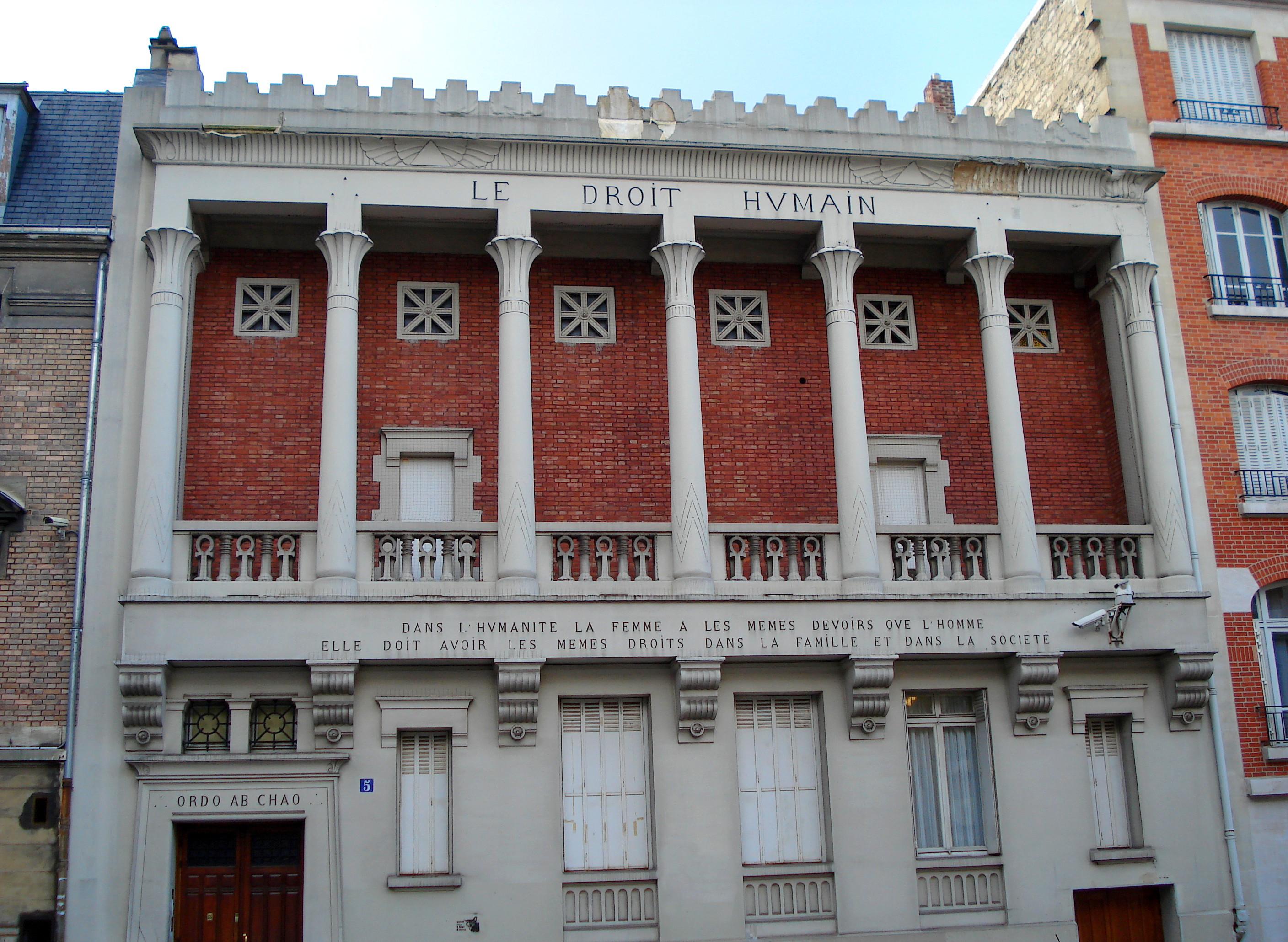 Bâtiment ancien du Droit Humain, 5 rue Jules Breton, Paris (XIIIe arrond.)